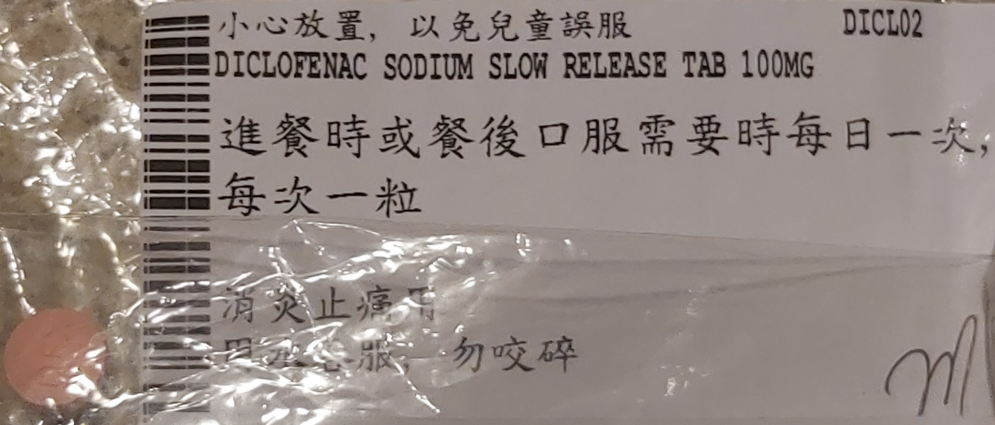 在香港醫院分發的慢速釋放 100 mg 雙氯芬酸錠片。本藥片由灣仔貝夫人醫務所藥房發出。